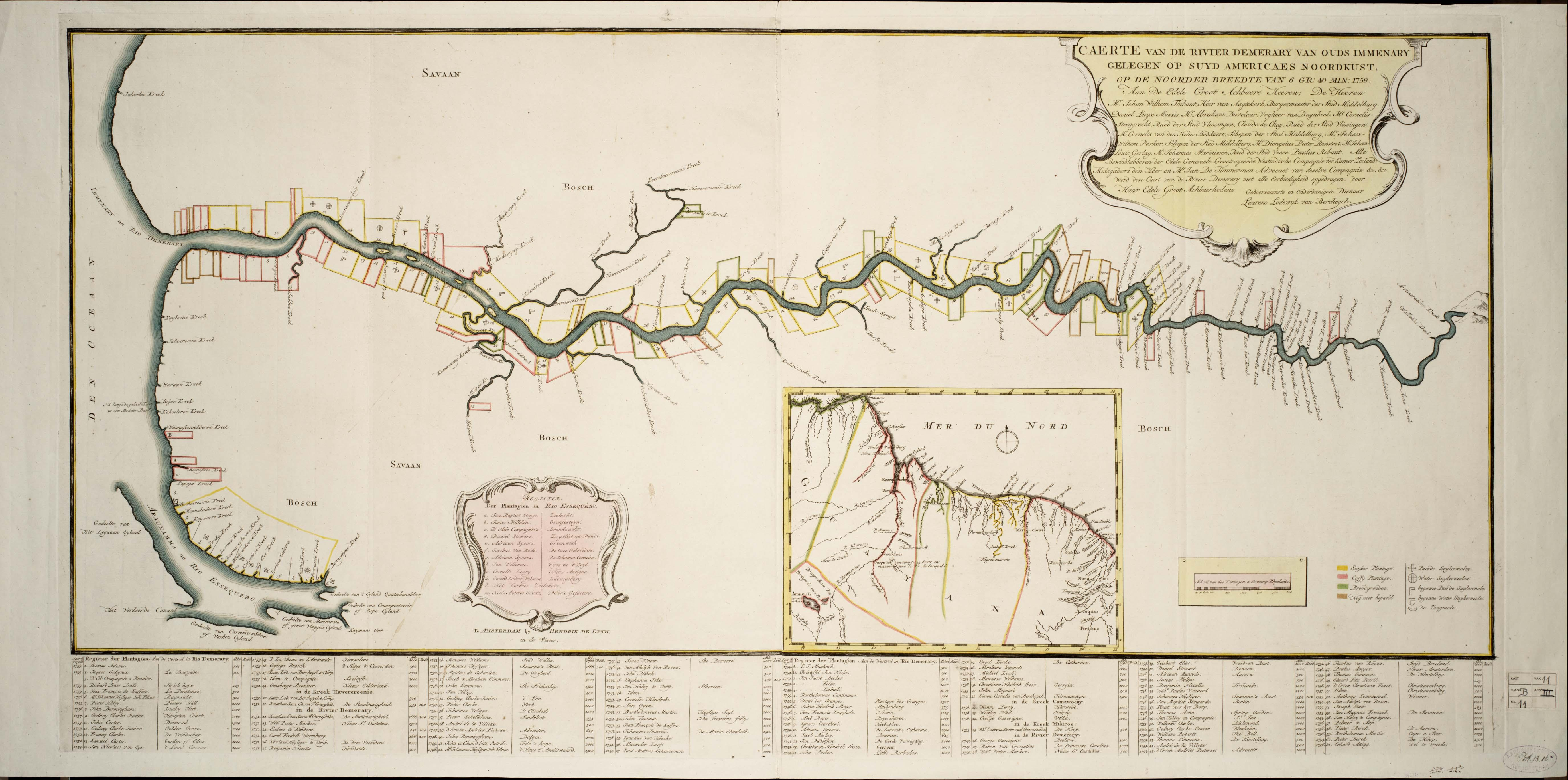 Caerte van de Rivier Demerary van ouds Immenary, geleger op Suyd Americaes Noordkust, op de Noorder Breedte van 6 Gr. 40 Zoom into this map at . Publisher: Leth, Henderick de Date: 1759 Location: Demerara River (Guyana) Dimension 44x100cm Scale: ca. 1:162,400 Call Number: G5252.D4 1759 .C34x